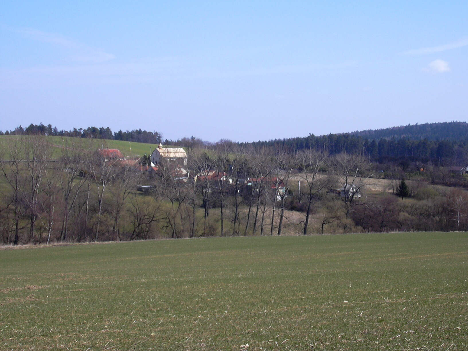 Ježkovice -krajina (Vyškov- Czech republic)